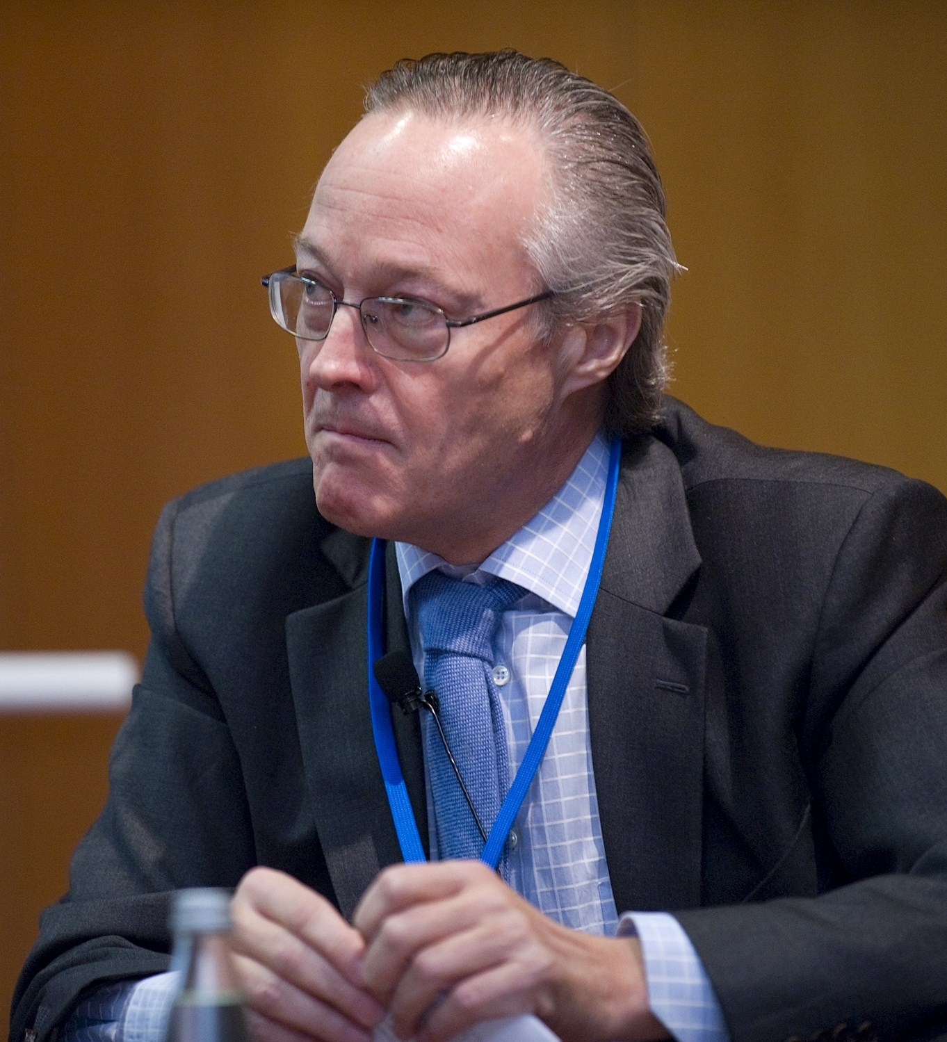 Josep Piqué, político español, en 2008.